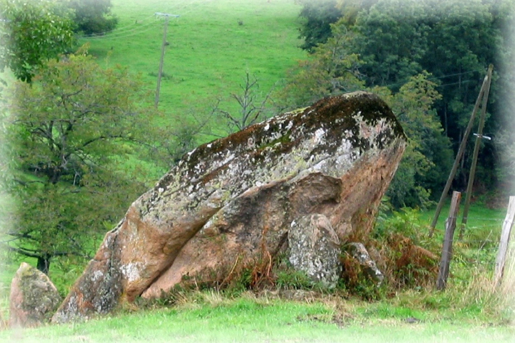 pierre à l'ane